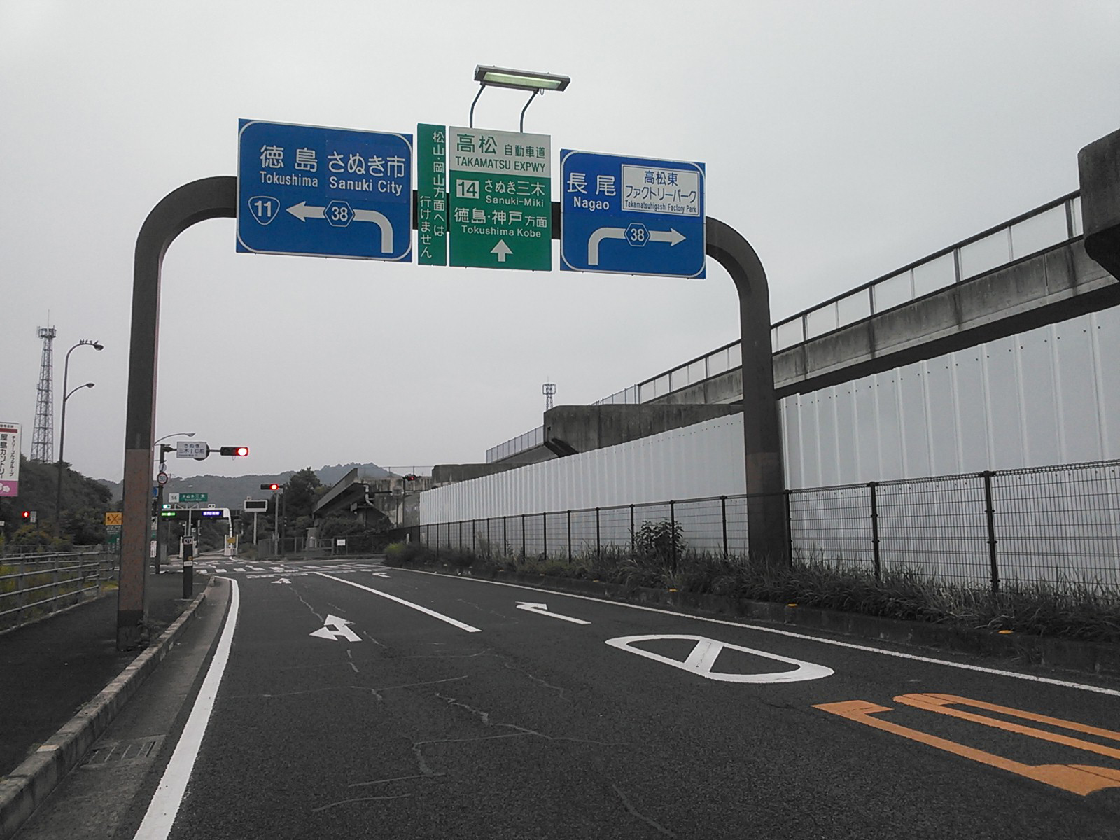 国道11号線バイパス高松東道路・三木町区間。さぬき三木インターチェンジ入口前案内看板。撮影者自身による撮影。